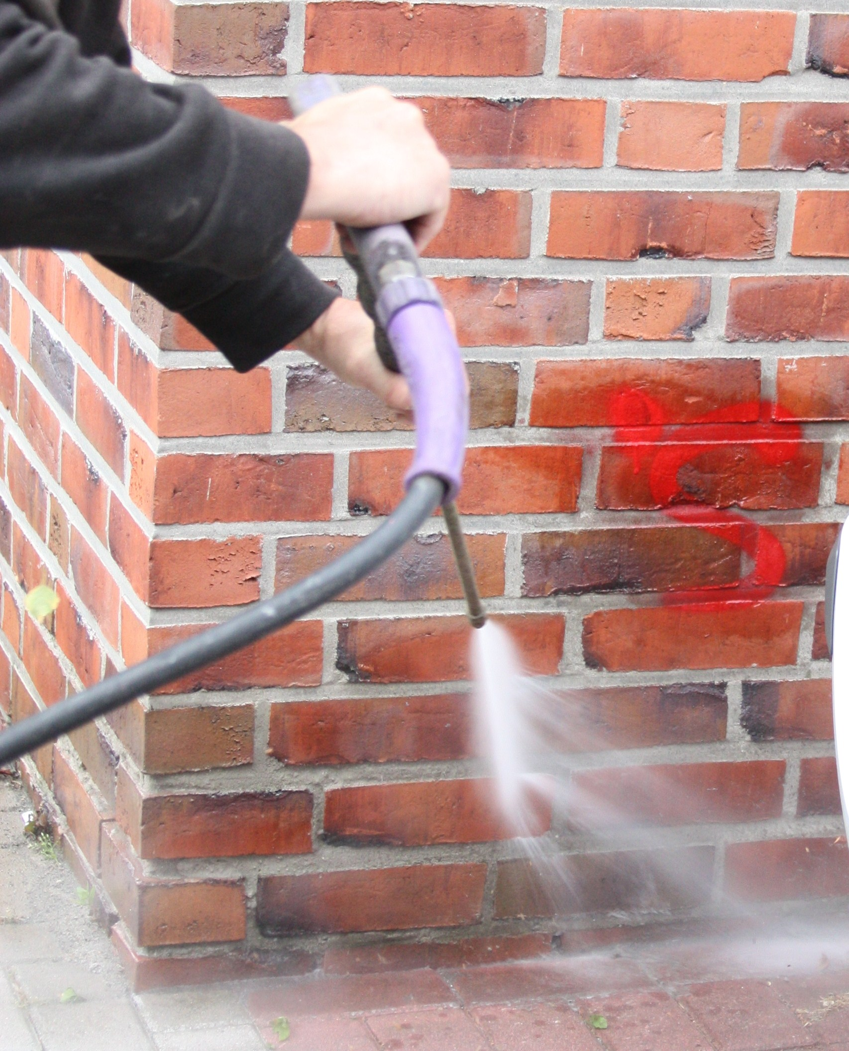 Graffiti Entfernung von einer gemauerten Wand; das Graffito war ungefähr 6 Monae alt; Kosten circa 250 Euro; Zeitaufwand 20-30 Minuten; das Graffito wird mit einer speziellen chemischen Lösung "Graffiti Remover" für einige Minuten aufgeweicht und dann mit einem Wasserstrahl - 300 bar Druck und sehr hohem Wasserdurchsatz gründlich und vollständig entfernt; die Firma hatte alles in einem speziellen Anhänger für den Druckkompressor; hat auch ihr Wasser mitgebracht; kein externer Wasseranschluss erforderlich.